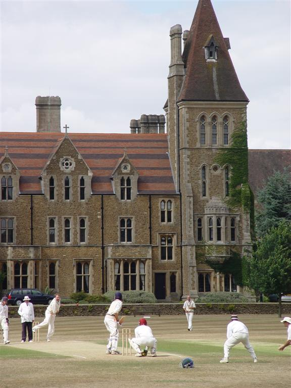 Flamingo's aan bat tegen Free Foresters - Charterhouse School, 1 augustus 2006